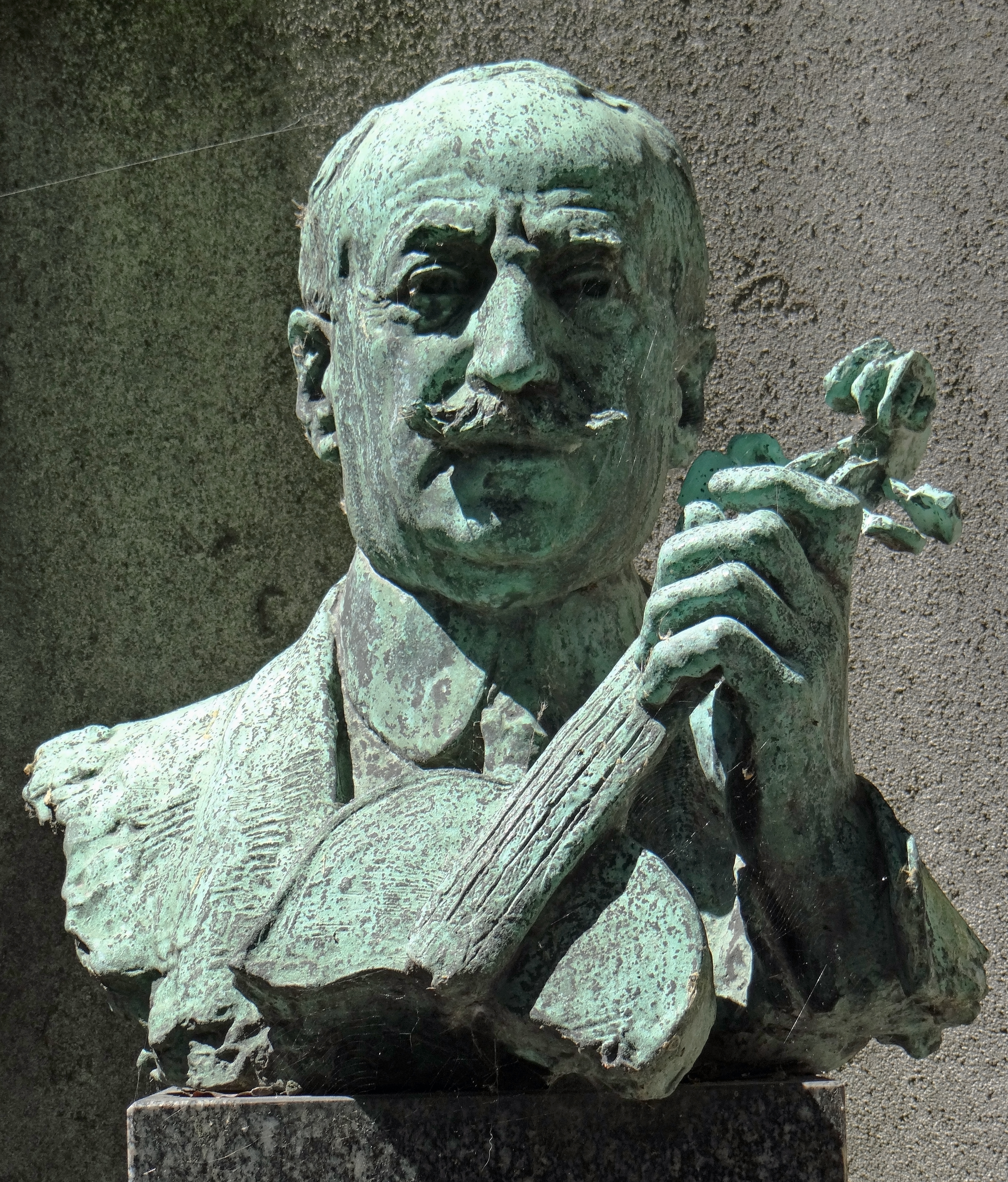 Cimetière de Montmartre - Tombe de Maurice Nadaud - Division 13